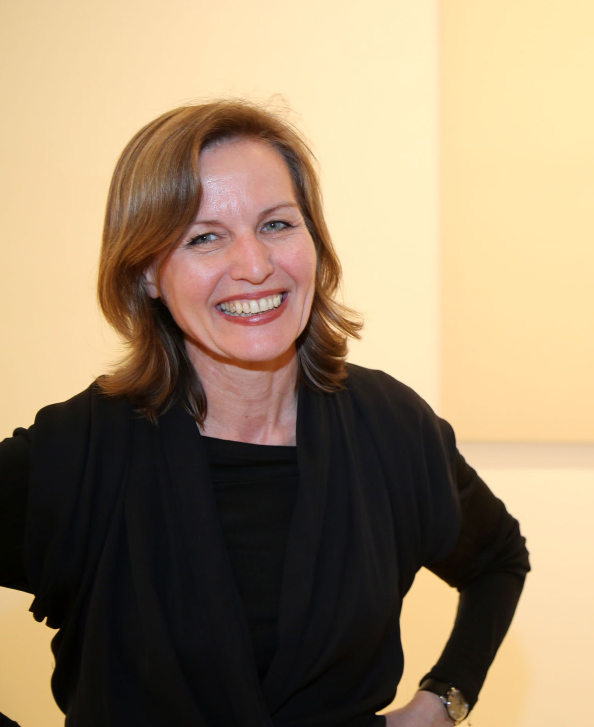 Breitwieser_Sabine,Attia_Kader-9120